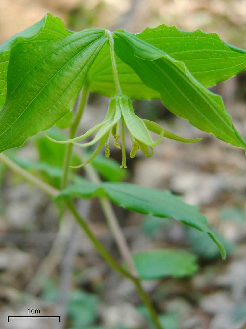 Prosartes lanuginosa 20100415.12 Great Smoky Mountains, NC